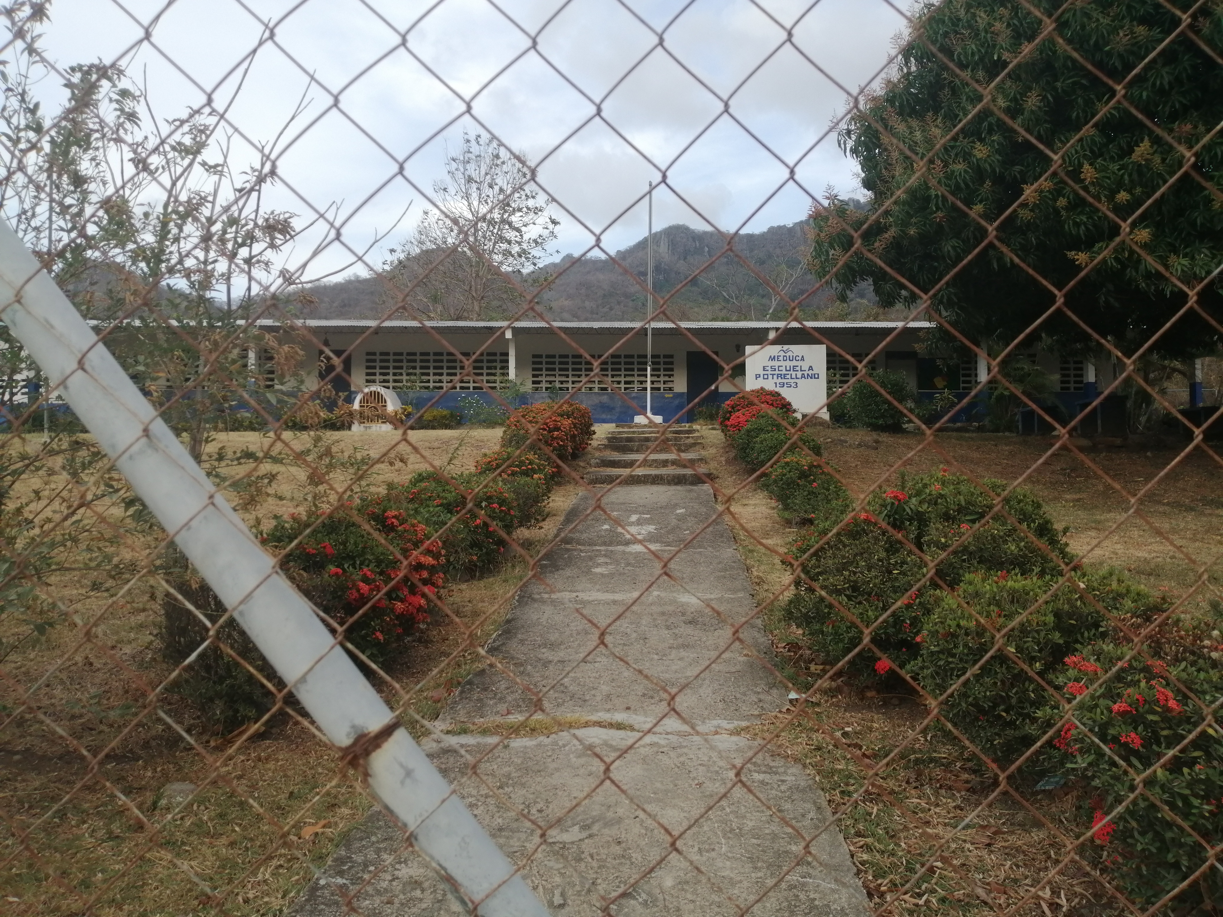 Es una escuela primaria multigrado